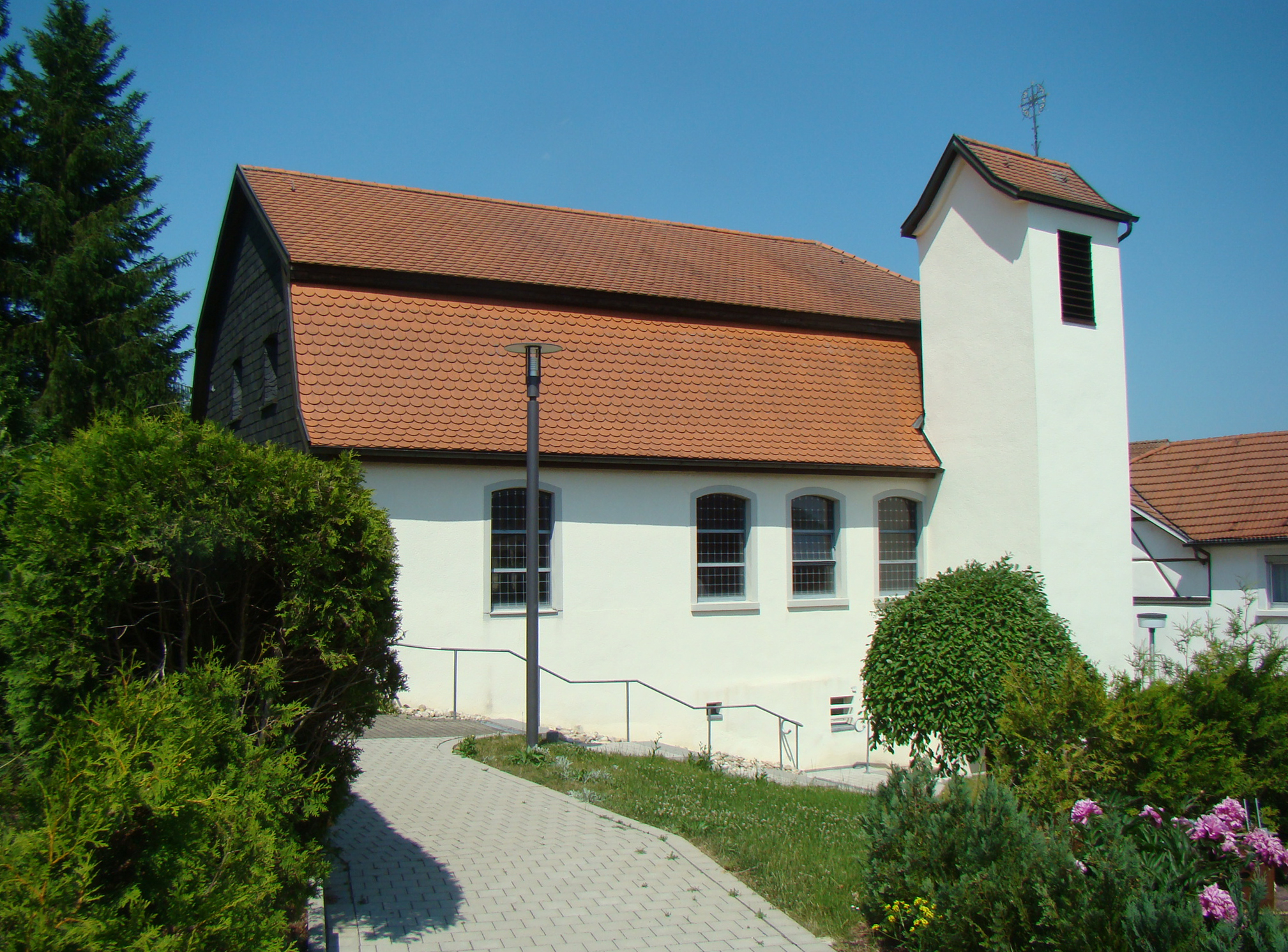 Herz-Jesu-Kirche in Merchingen, ehem. Synagoge der jüdischen Gemeinde